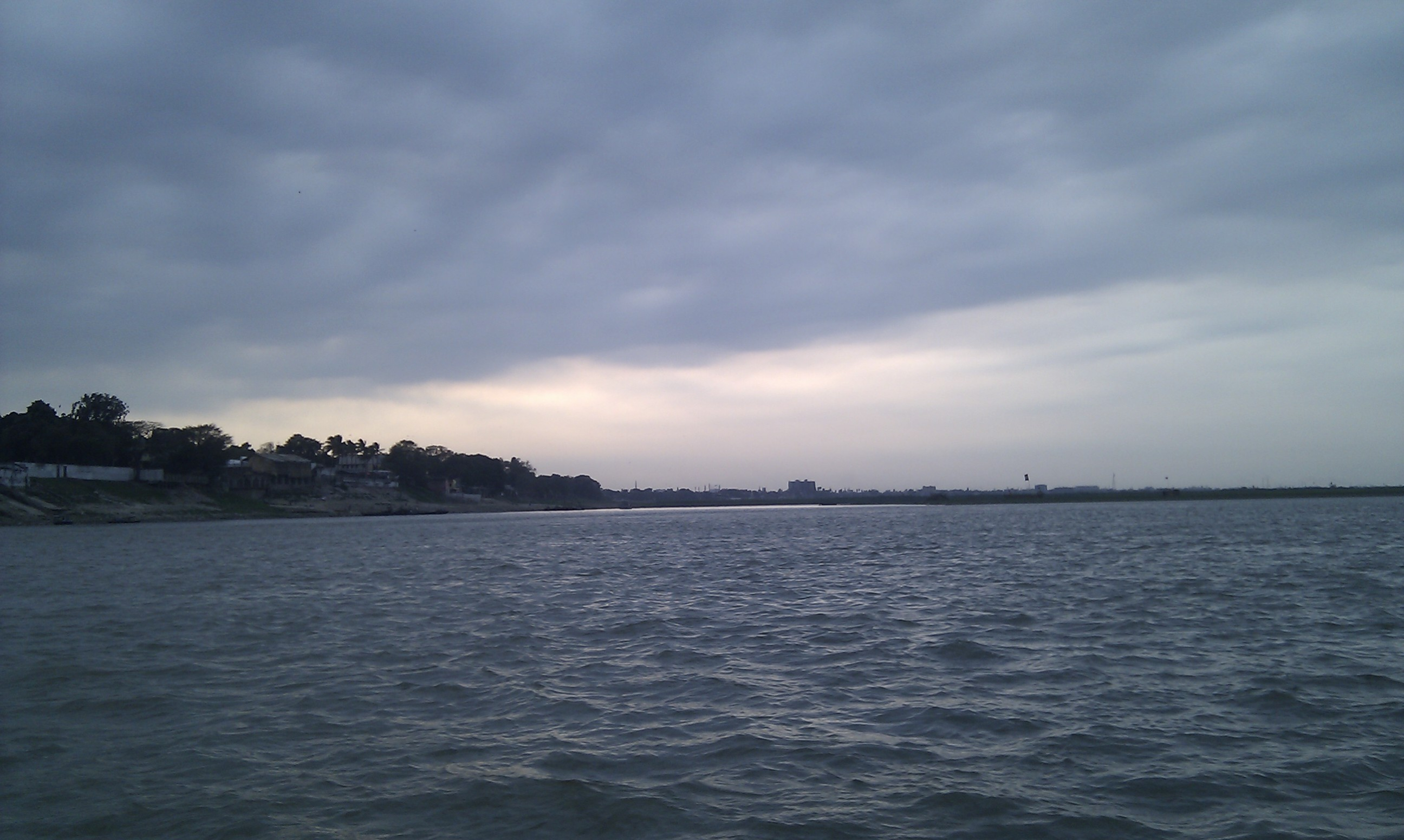 Ganges @ patna